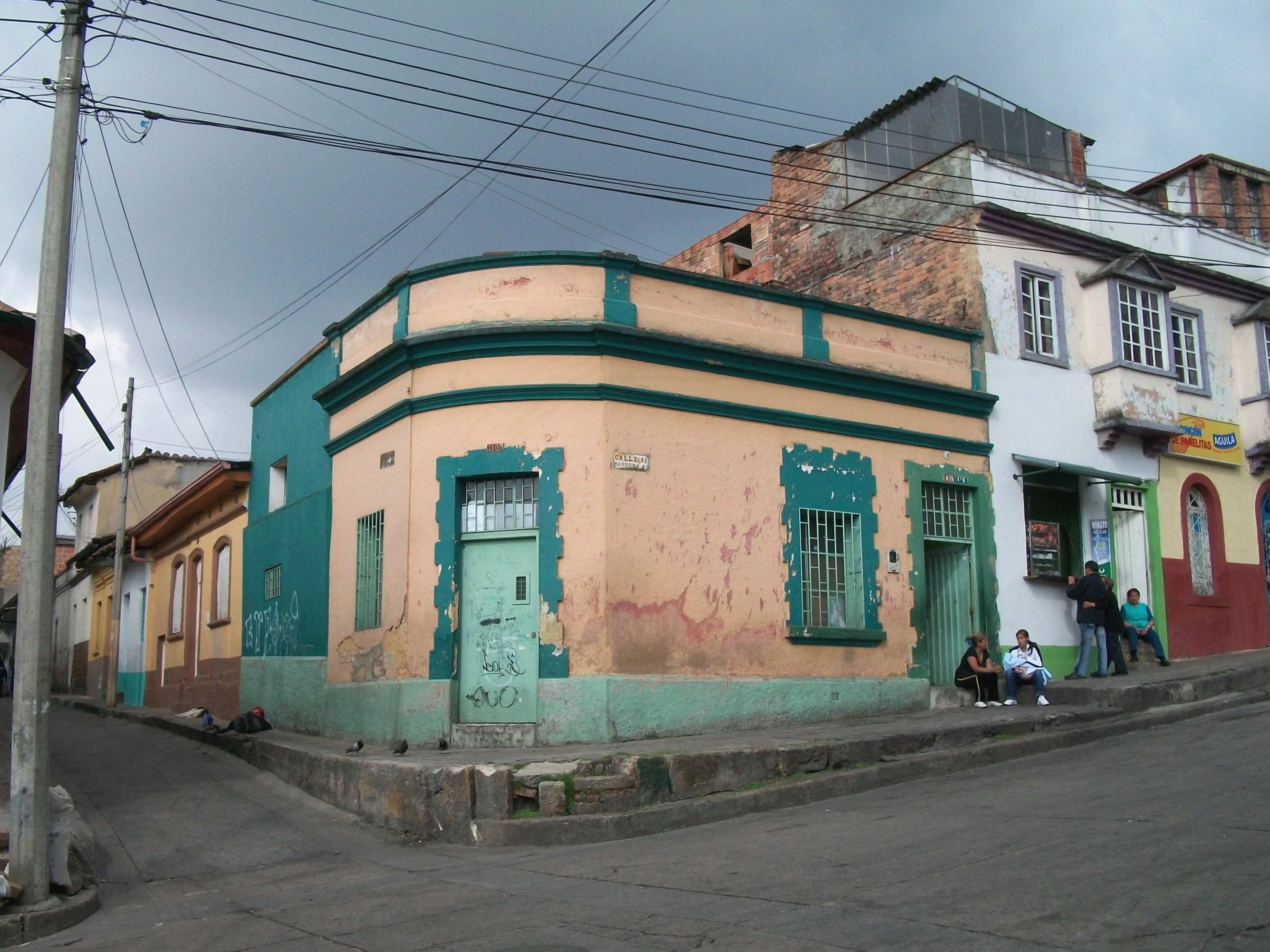 Bogotá barrio La Perseverancia, calle 31 con cra 4a.